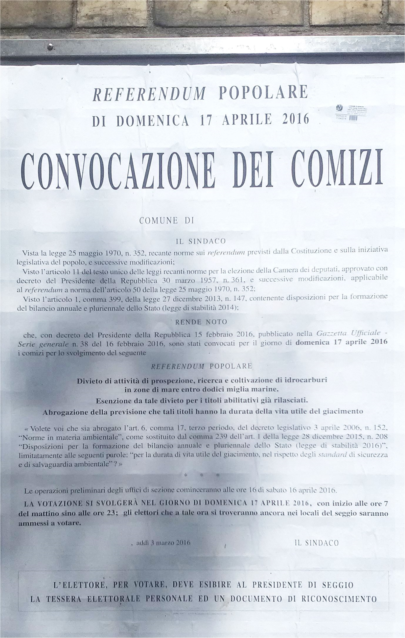 Manifesto di convocazione dei comizi in occasione del referendum sulle trivelle del 17 aprile 2016